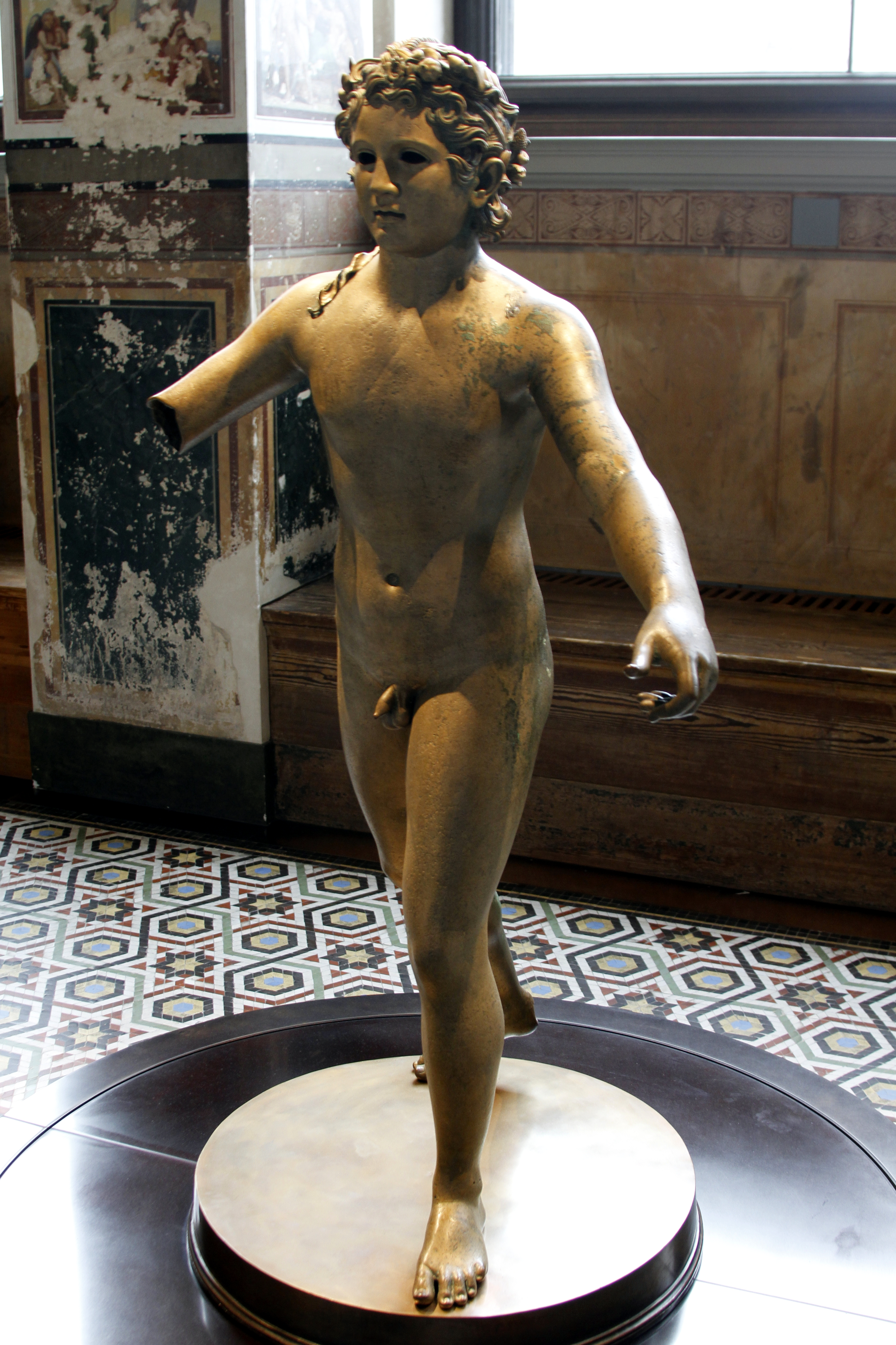 Neues Museum - Berlin - Germany